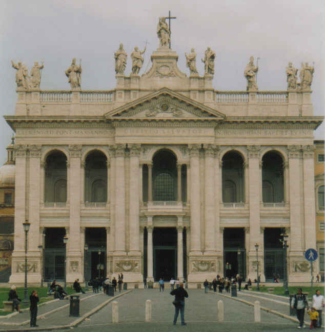 Die Fassade der Lateranbasilika